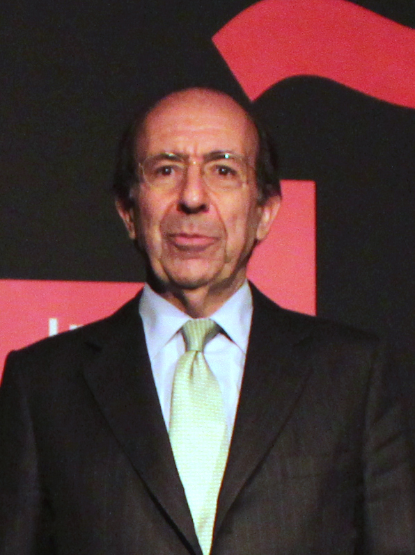 Profesor Kazuhiro Nogami de la Tokyo Metropolitan University. 野上和裕、首都大学東京・社会科学研究科法学政治学専攻 都市教養学部法学系教授（西洋政治史専攻） Javier Moreno Luzón, profesor e investigador de la Universidad Complutense de Madrid. マドリード・コンプルテンセ大学のハビエル・モレノ・ルソン教授 Gonzalo de Benito, embajador de España en Japón. ゴンサロ・デ・ベニト、スペイン大使 Antonio Gil de Carrasco, director del Instituto Cervantes de Tokio. アントニオ・ヒル・デ・カラスコ 、 セルバンテス文化センター東京 館長